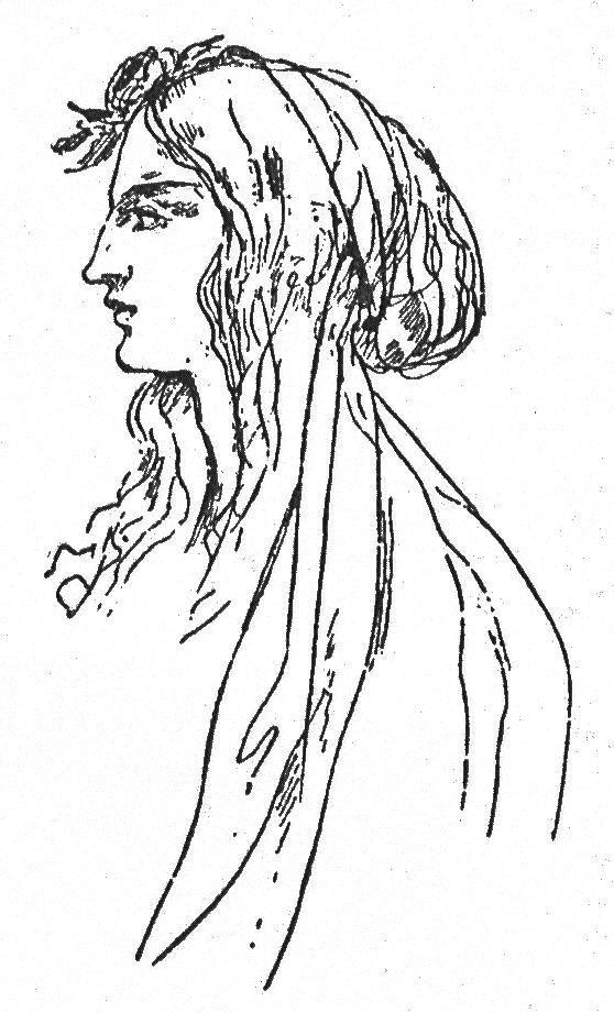 grafika z książki Dzieła Cyprjana Norwida: (drobne utwory poetyckie - poematy - utwory dramatyczne - legendy, nowele, gawędy - przekłady - rozprawy wierszem i prozą)